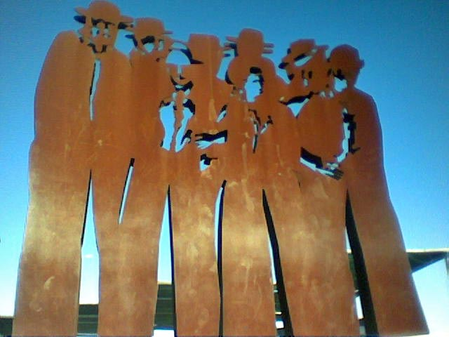 Coro Alentejano Sculpture by José Simão, Área de Serviço de Grândola, Portugal.